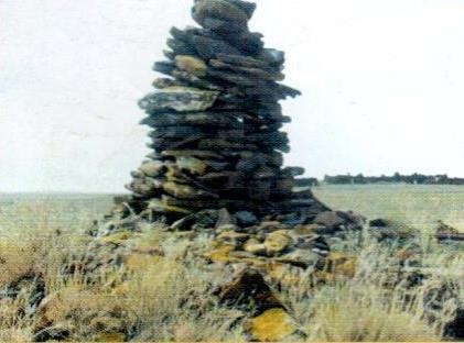 Қазақша (кирил): Мәні әулие қорымы